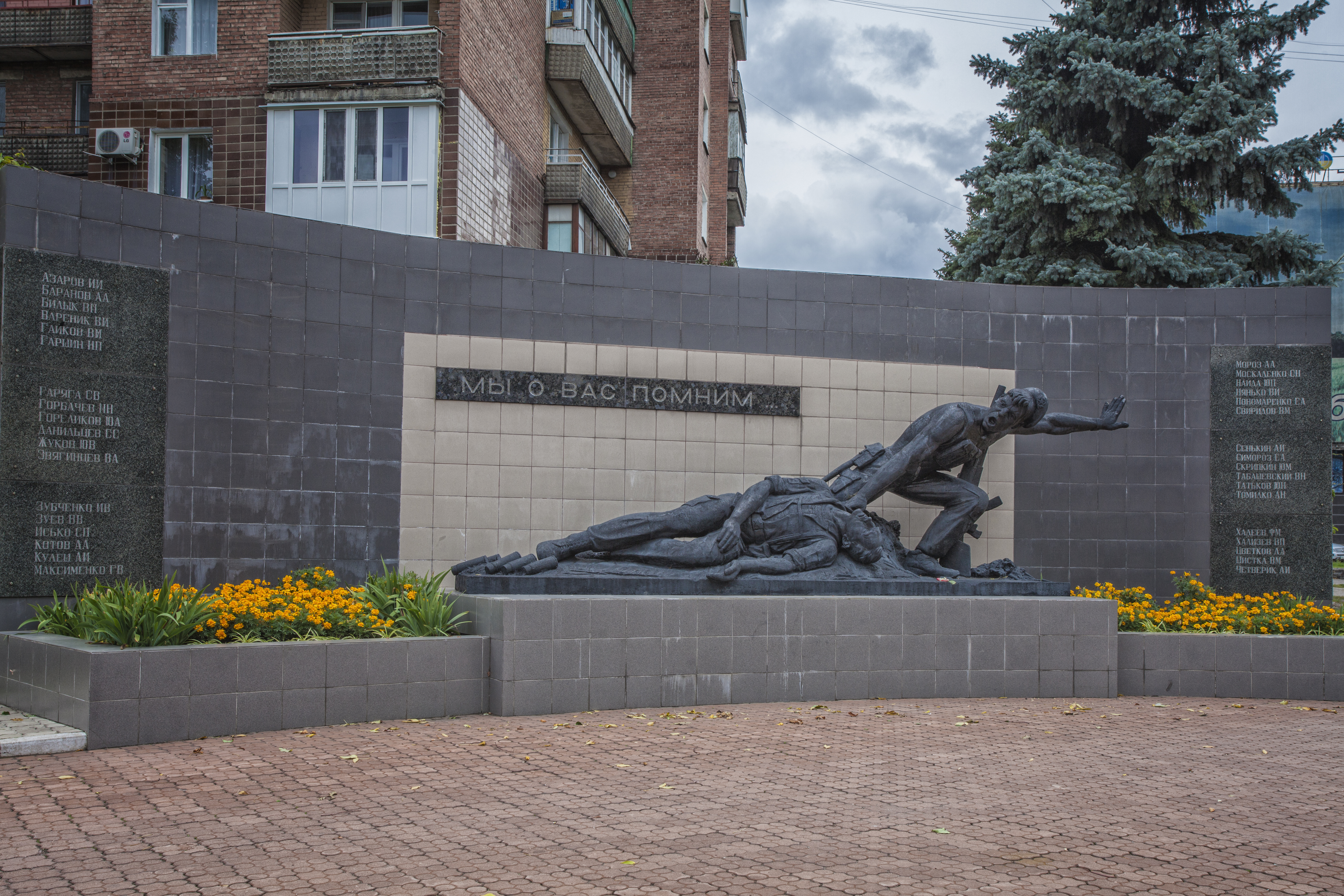 Пам'ятник загиблим воїнам-інтернаціоналістам., Макіївка, Центрально-Міський р-н, вул. 250-річчя Донбасу, 7